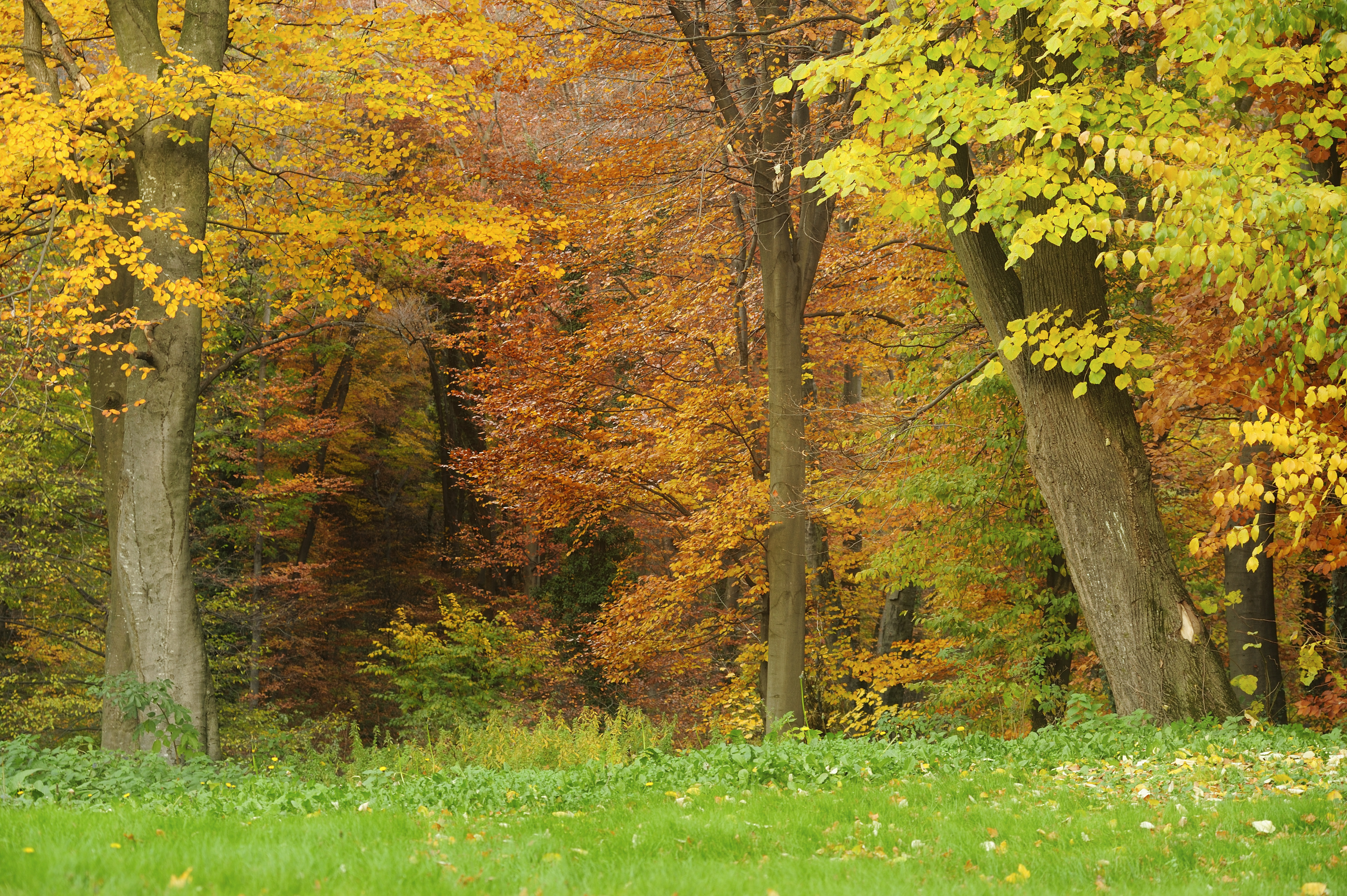 Ово је фотографија заштићеног природног добра у Србији под шифром: НП01 This is a a photo of a natural area in Serbia with ID: НП01 Srpski (latinica): НП01 Национални парк Фрушка гора